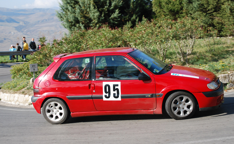 Carlo Cammarata Citroen Saxo VTS